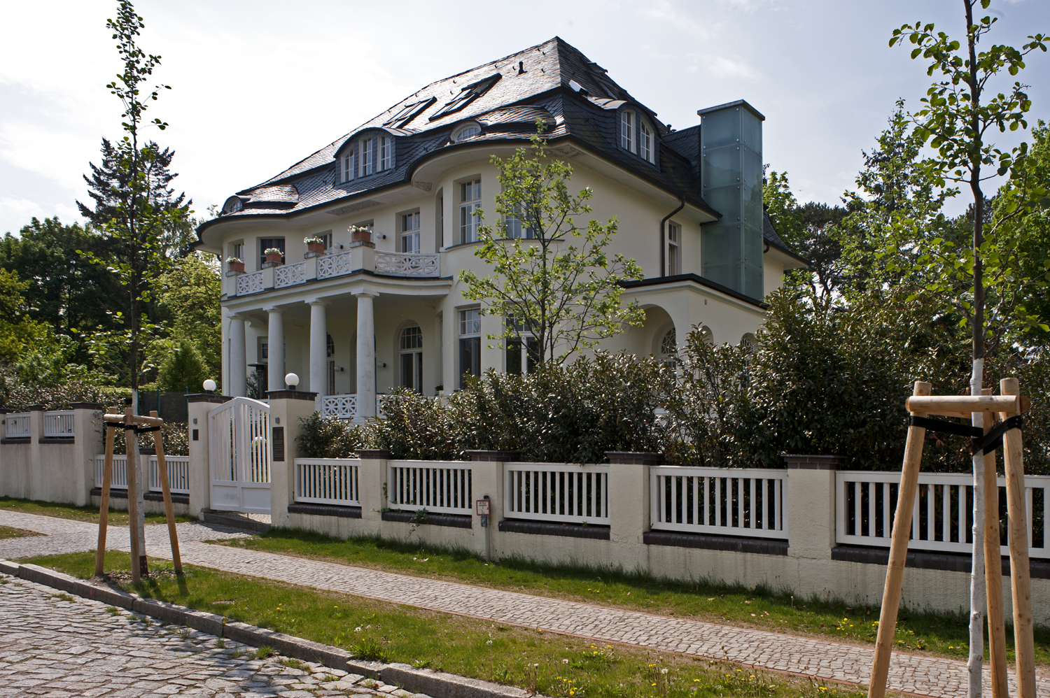 Kleinmachnow: Villa Patermann 2011